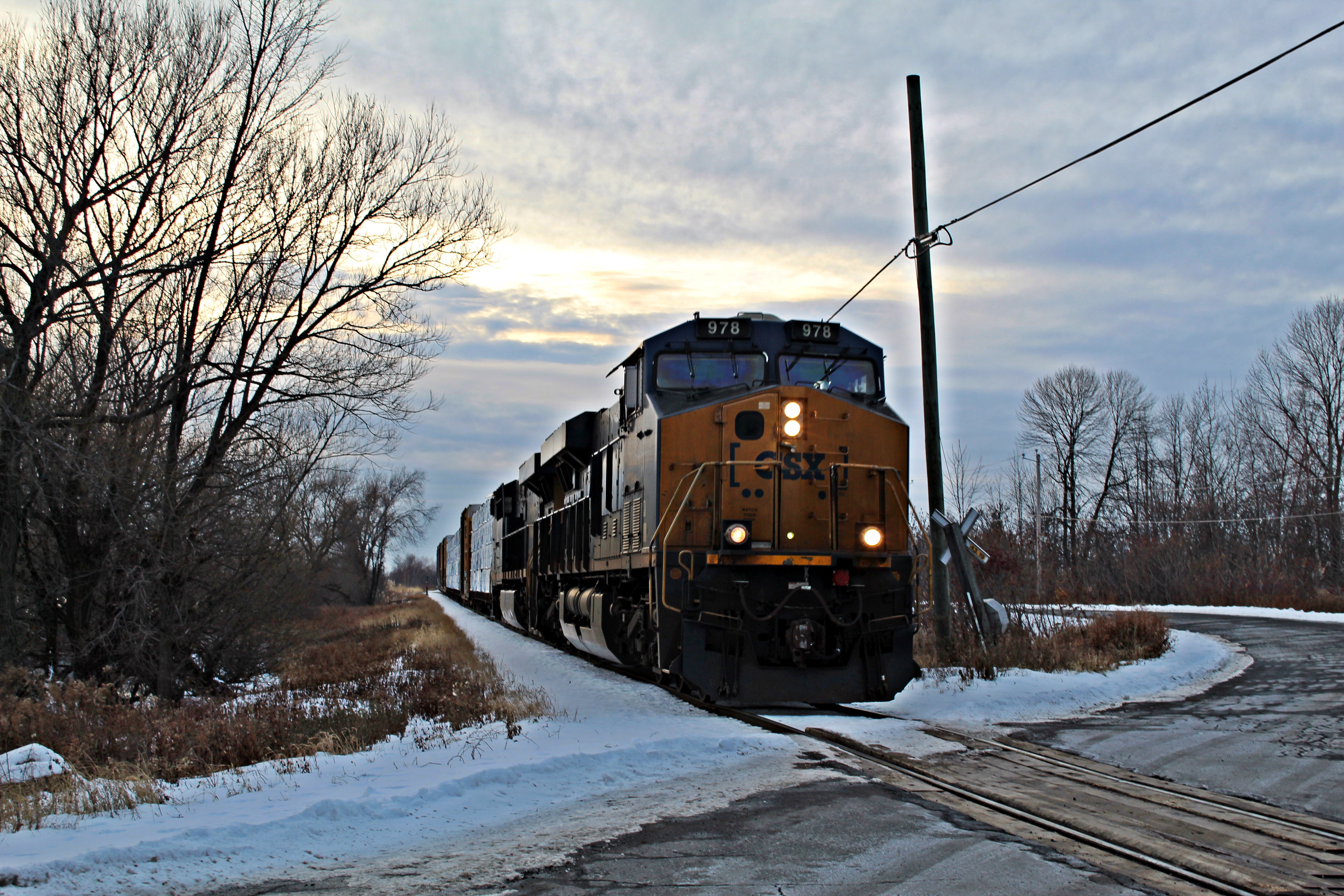 Train du CN #327 à l'île Clark (île aux Chats).